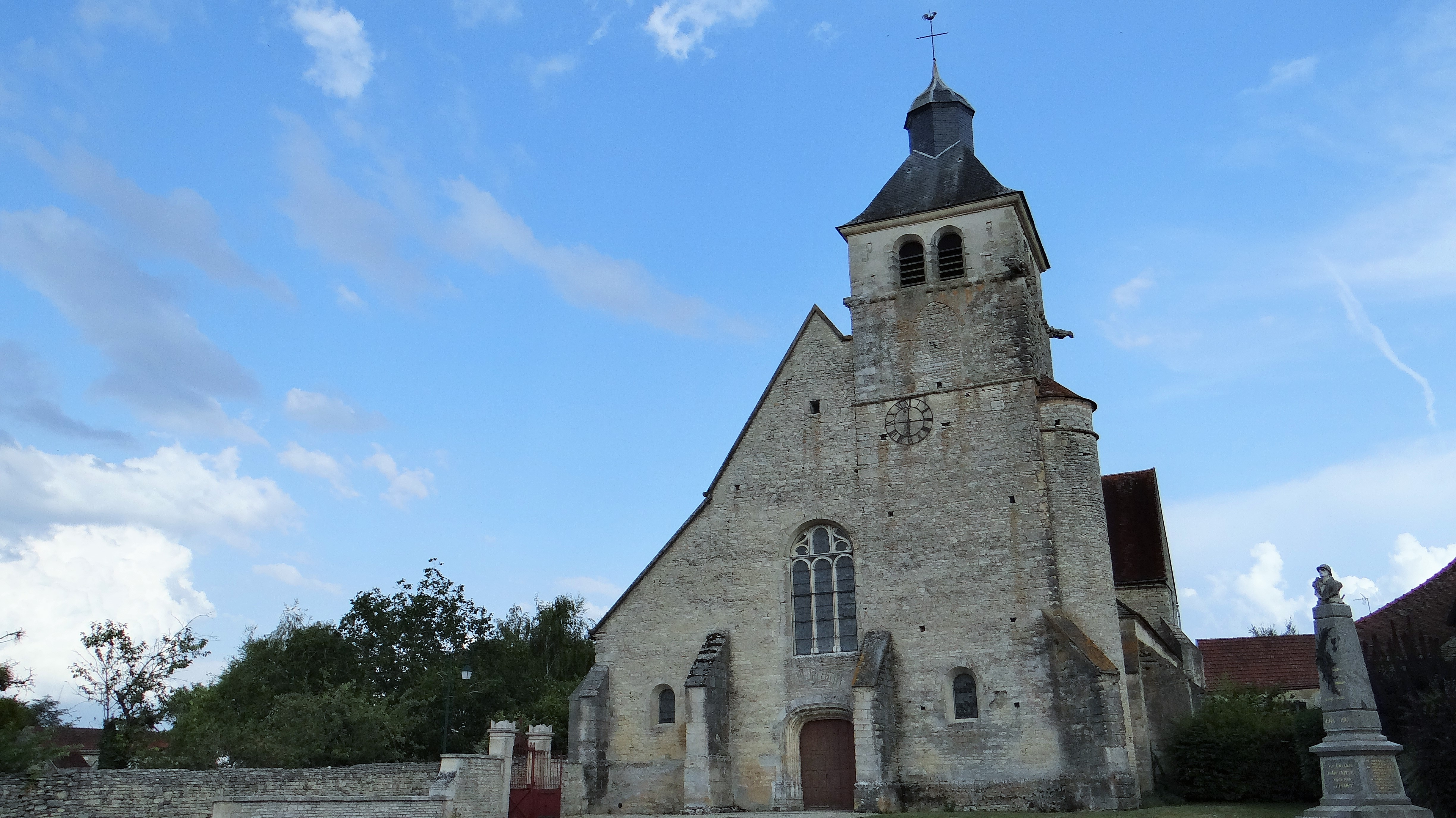 Église d'Argenteuil-sur-Armançon .